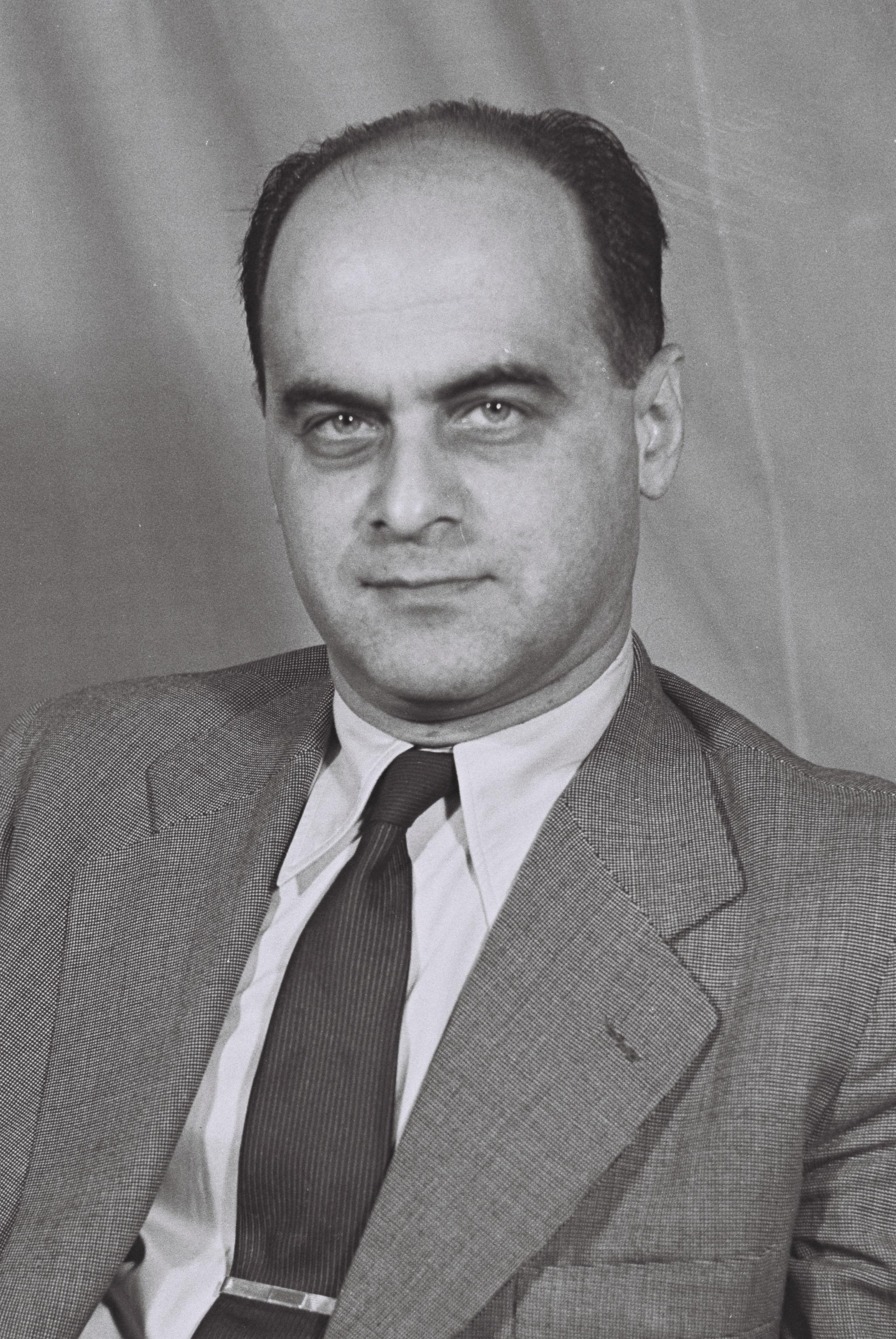 זלמן סוזאיב